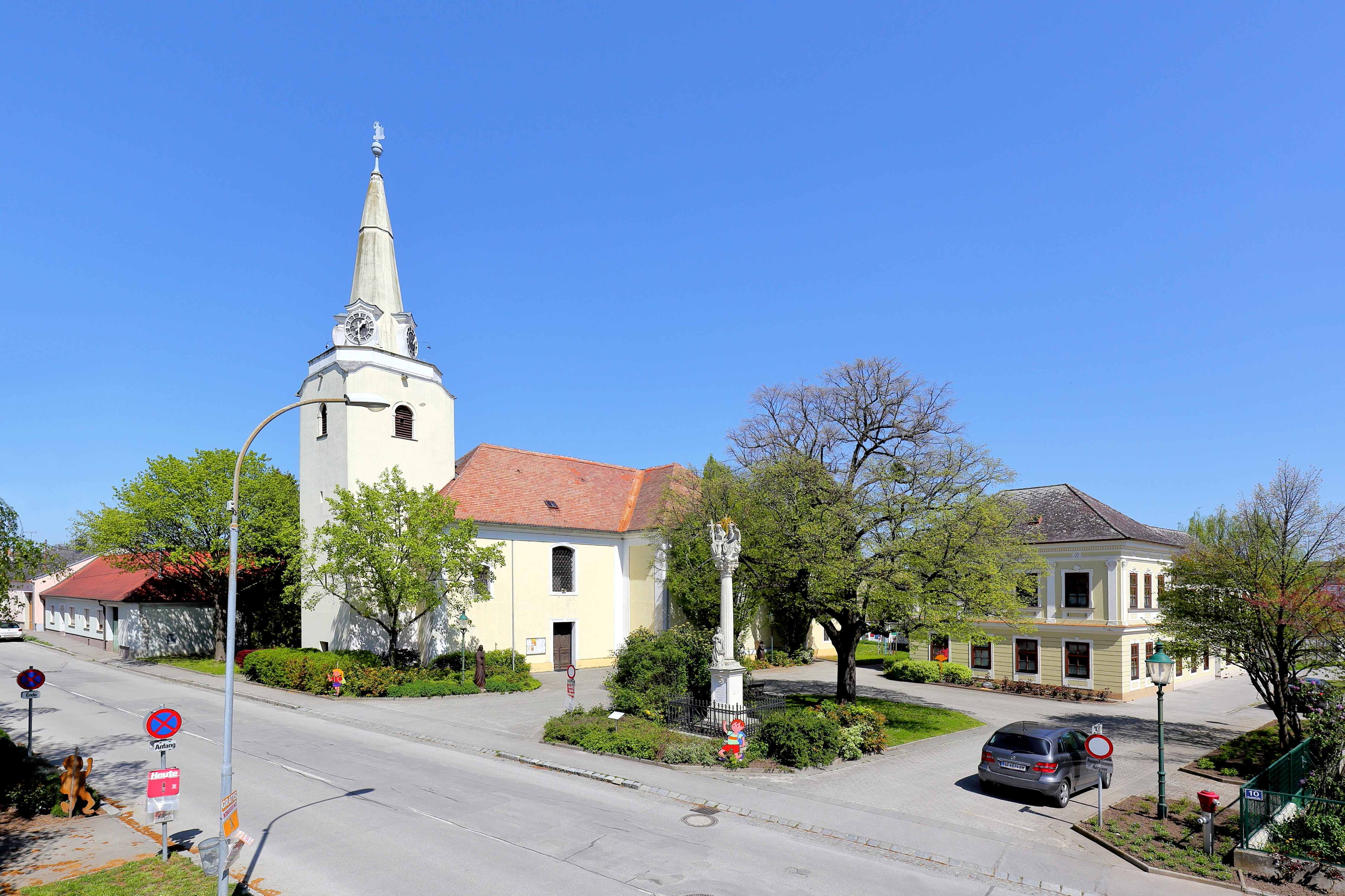 Ortszentrum der niederösterreichischen Marktgemeinde Drösing mit der Pfarrkirche hl. Laurentius, der Dreifaltigkeitssäule und der Volksschule (rechts).